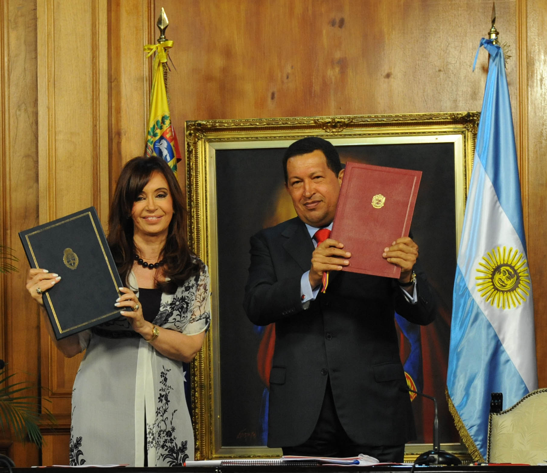 La presidenta Cristina Fernández y su par de Venezuela, Hugo Chávez Frías, en la firma de acuerdos en Caracas